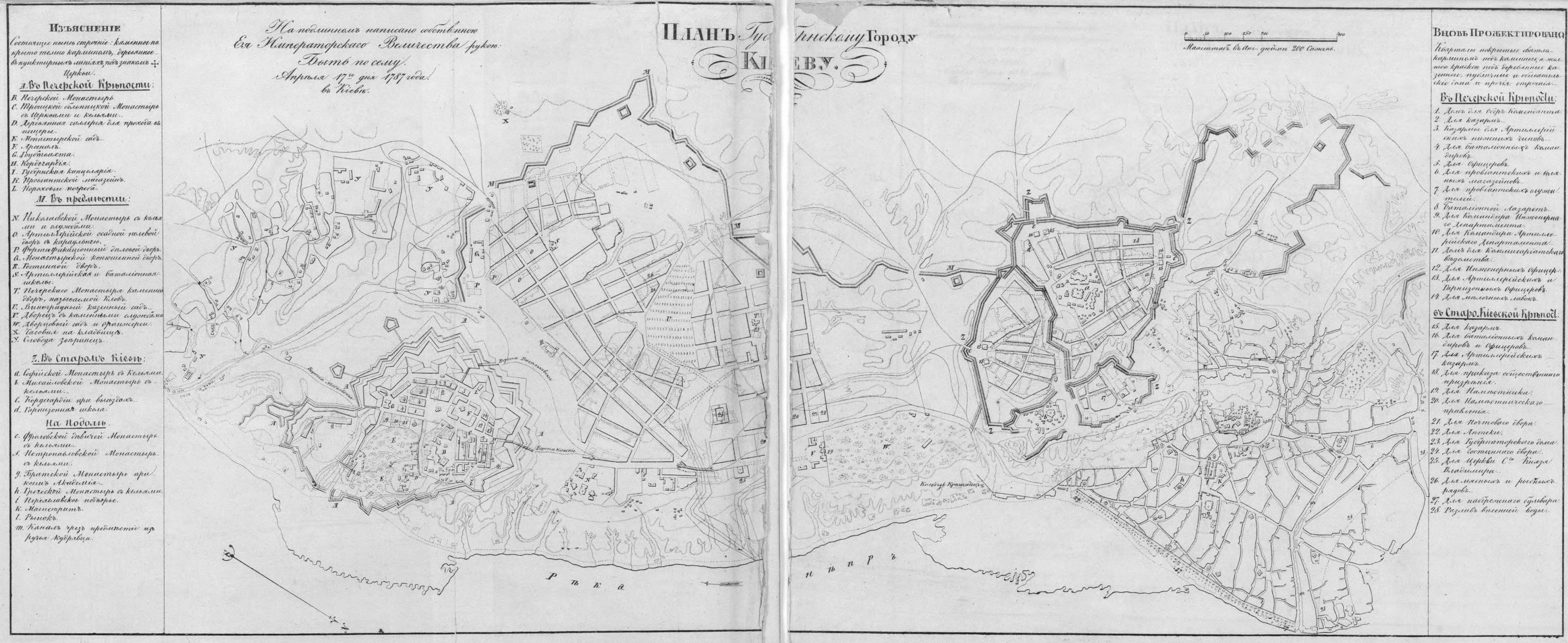 Полное Собрание Законов Российской Империи. Собрание первое. Книга чертежей и рисунков. (Планы городов).; 1839, Санктпетербургъ, Въ Типографіи II Отделенія Собственной Е. И. В. Канцеляріи.